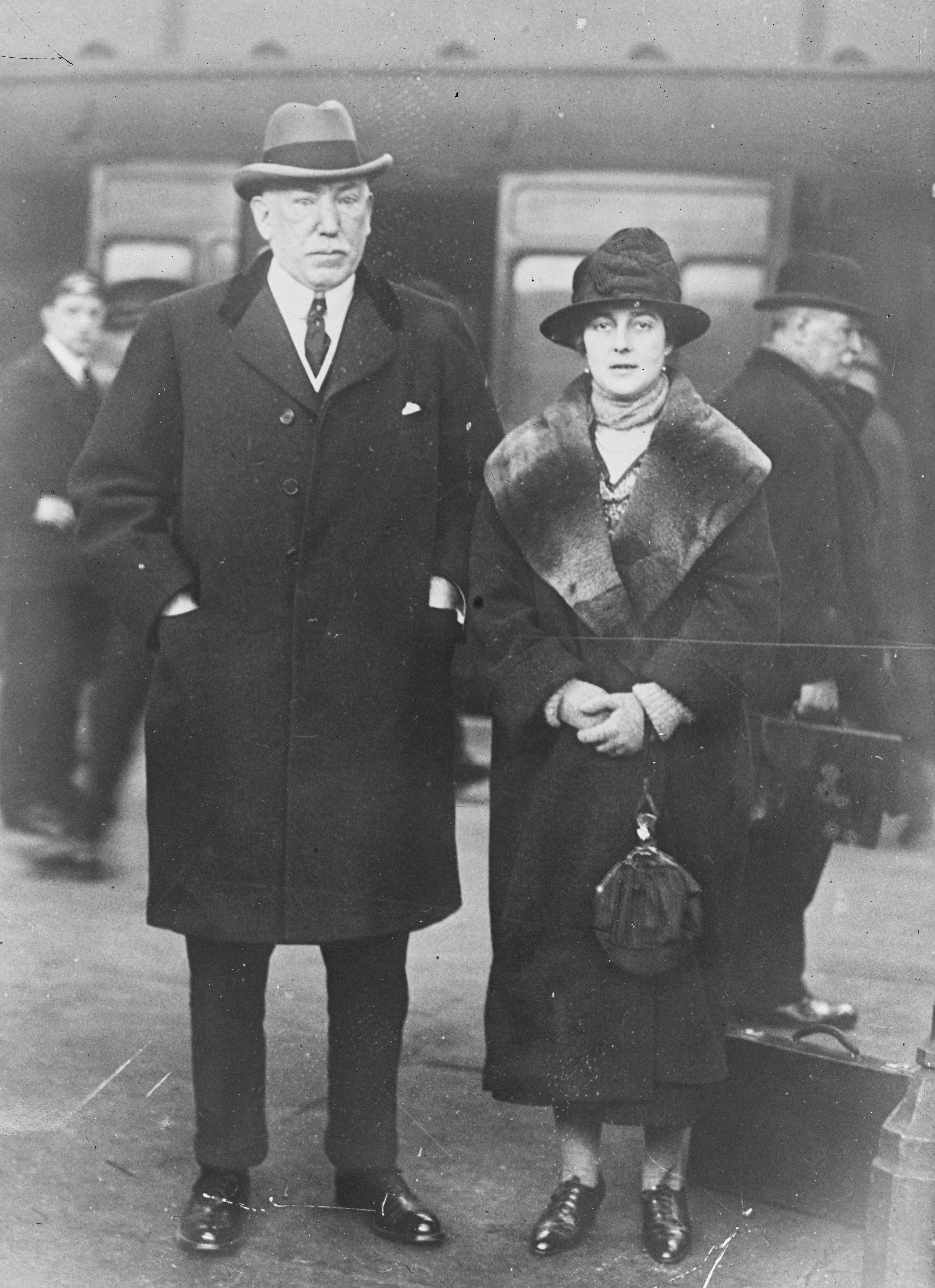 James Craig (1871-1940) et Cecil Marie Nowell Dering Tupper (1883-1960)